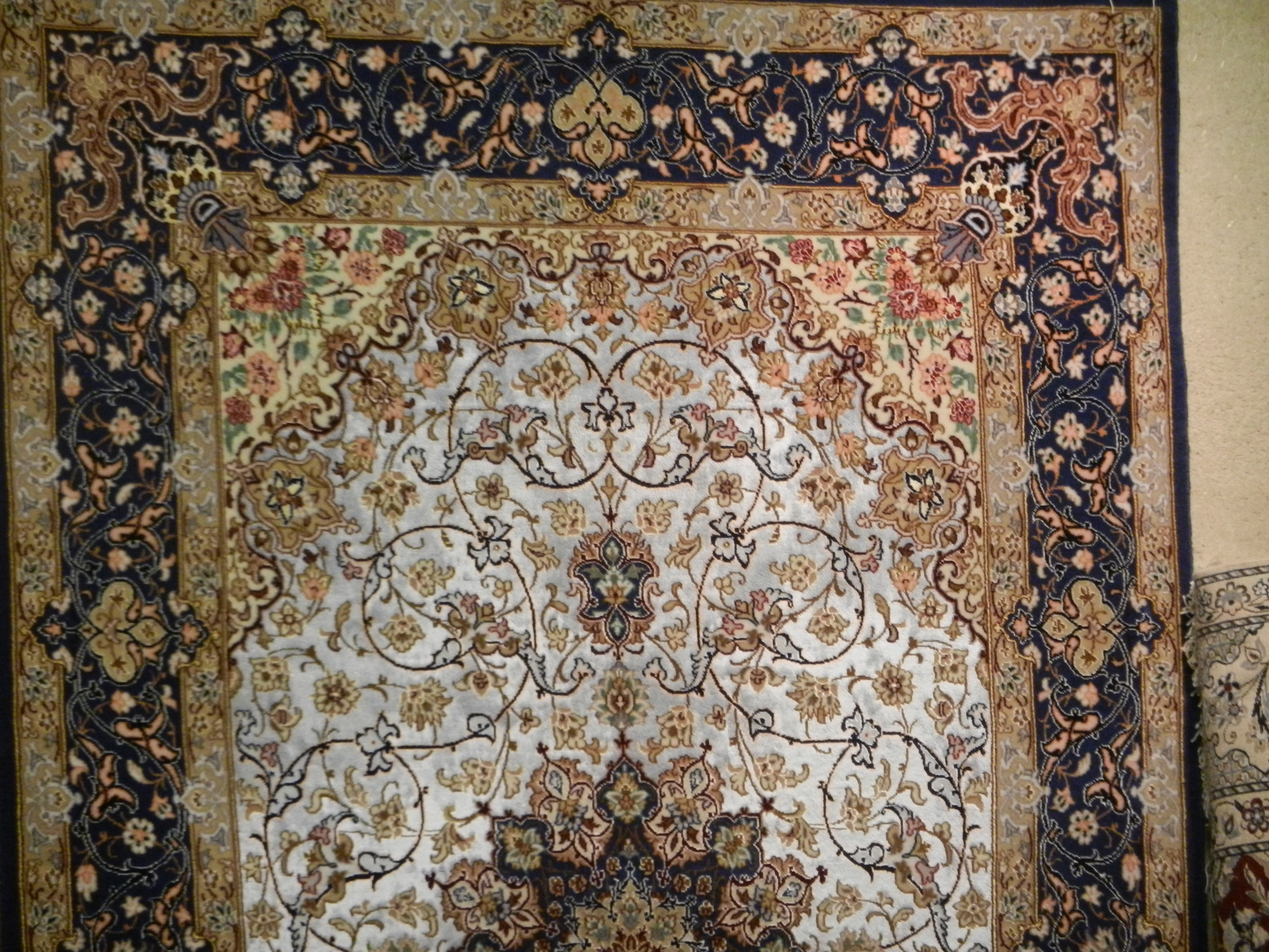 Isfahan, Iran - perzijska svilena preproga.